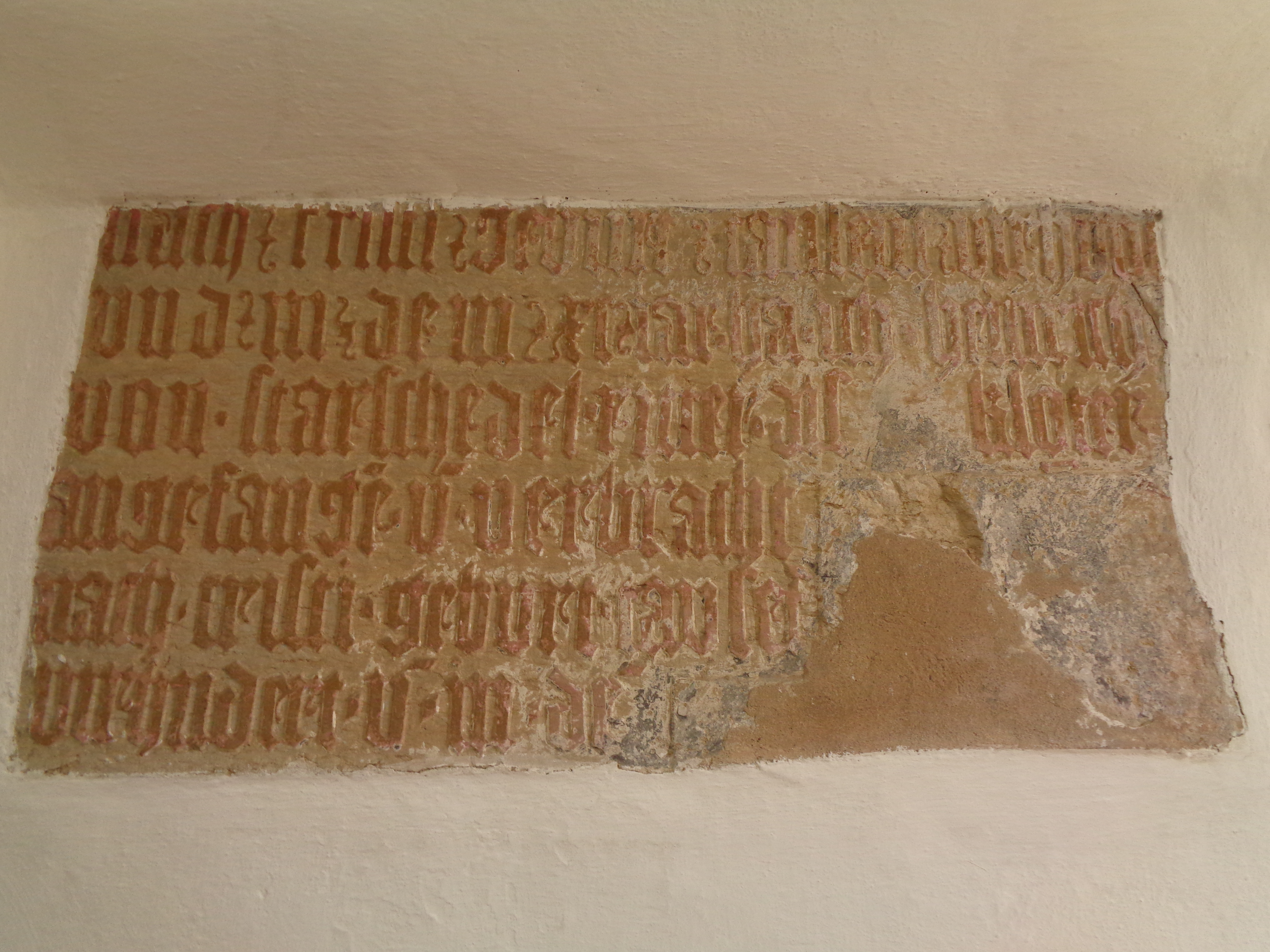 Inschriftstein in der südlichen Seitenkapelle der Stadtkirche von Mutzschen mit Text zur Gründung des Kloster Mutzschen durch Heinrich von Starschedel, Mutzschen, Stadt Grimma, Landkreis Leipzig, Sachsen